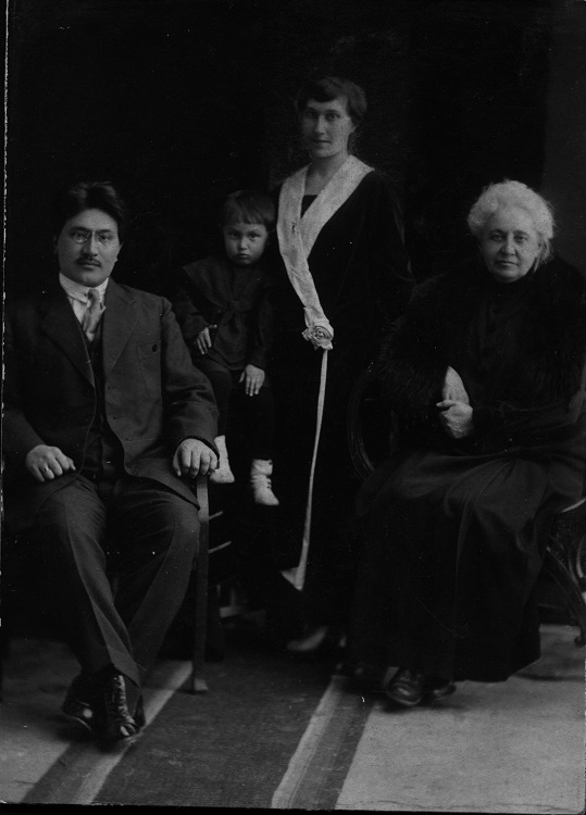 А.Ермеков с супругой, сыном и гувернанткой, 1925 год (из личного архива сына А.Ермекова – Магауи Ермекова)